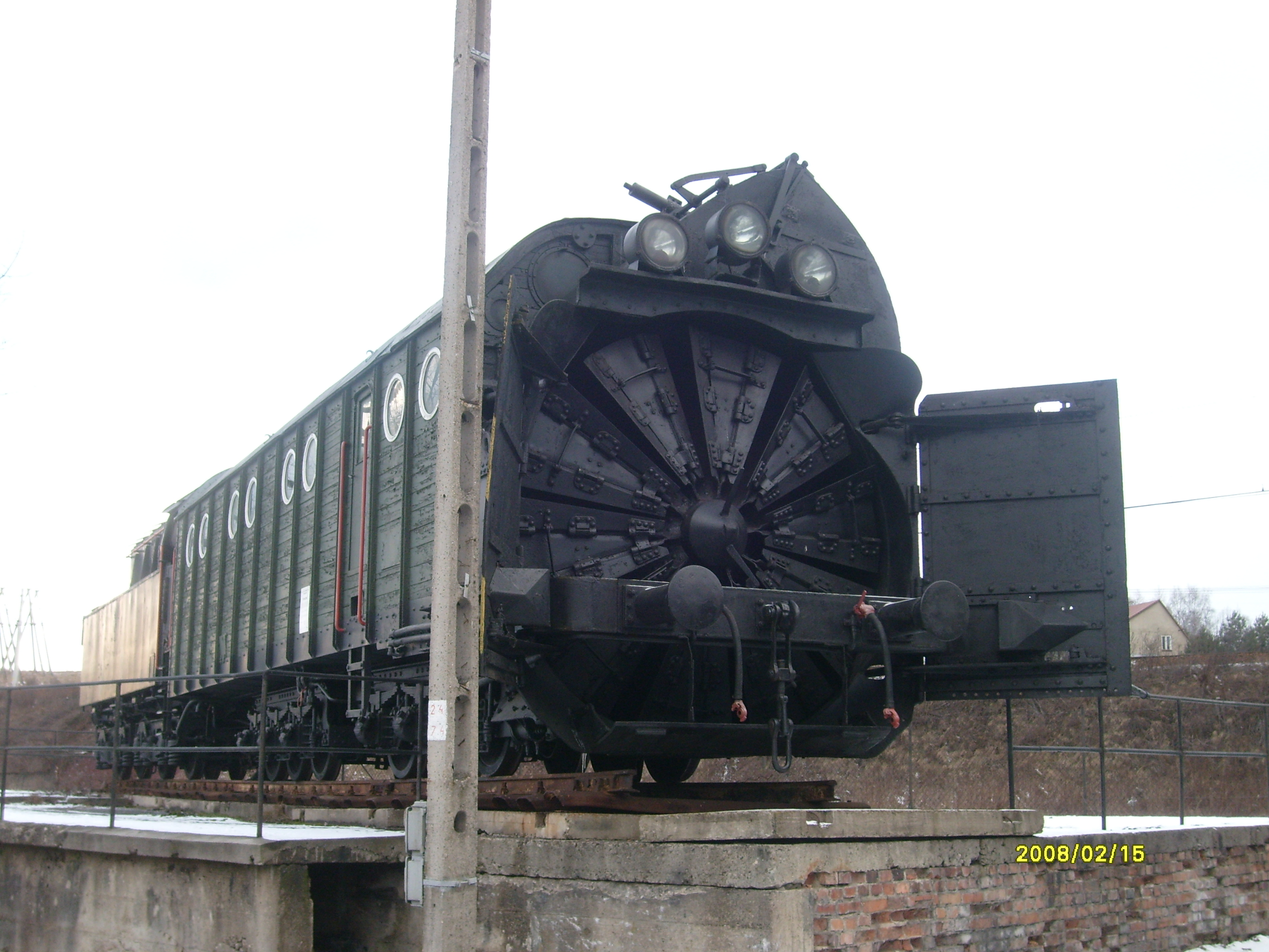 Pług odśnieżny Henschel w Skansenie Taboru Kolejowego w Chabówce.